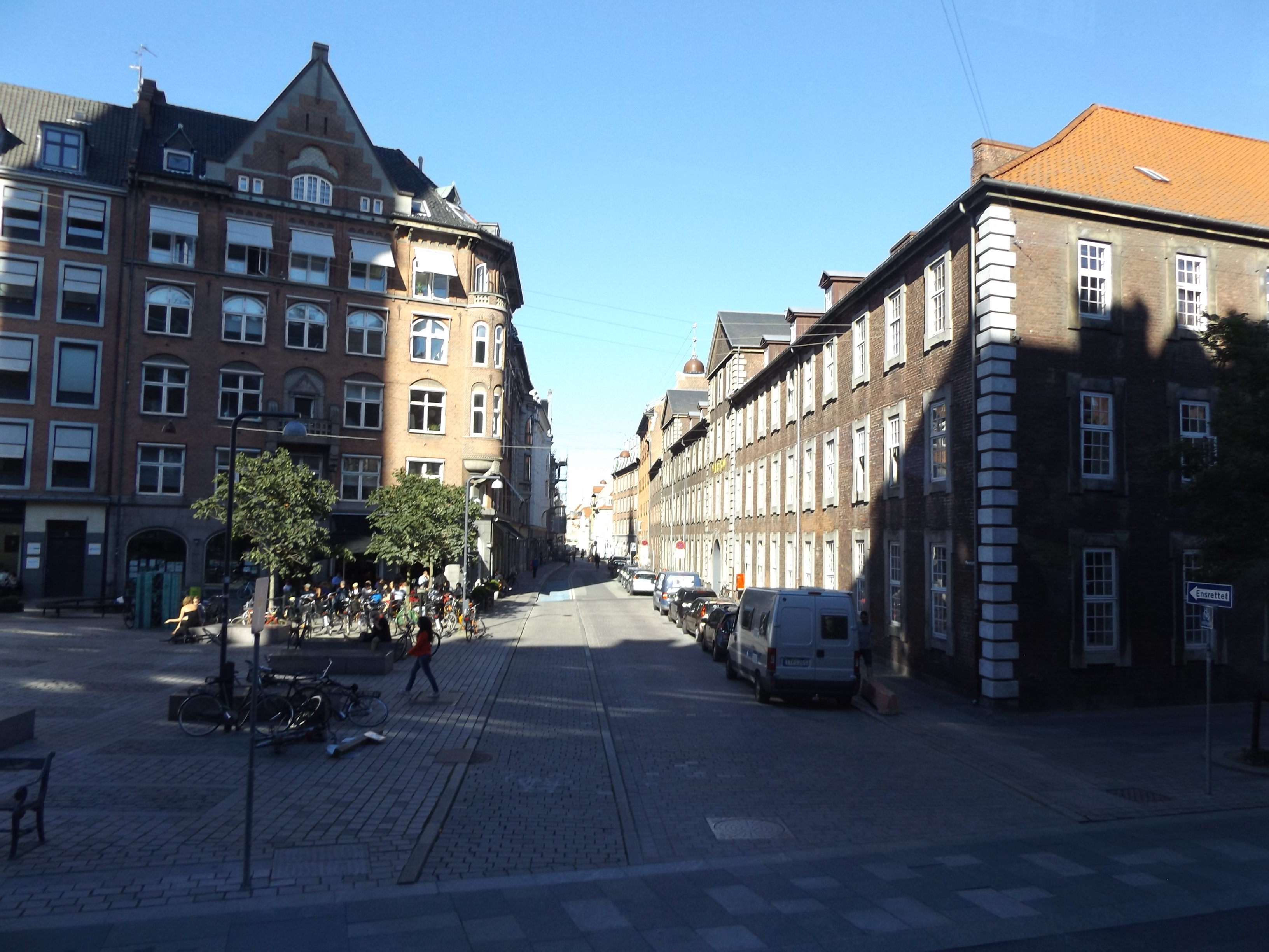 Farvergade in Copenhagen, Denmark